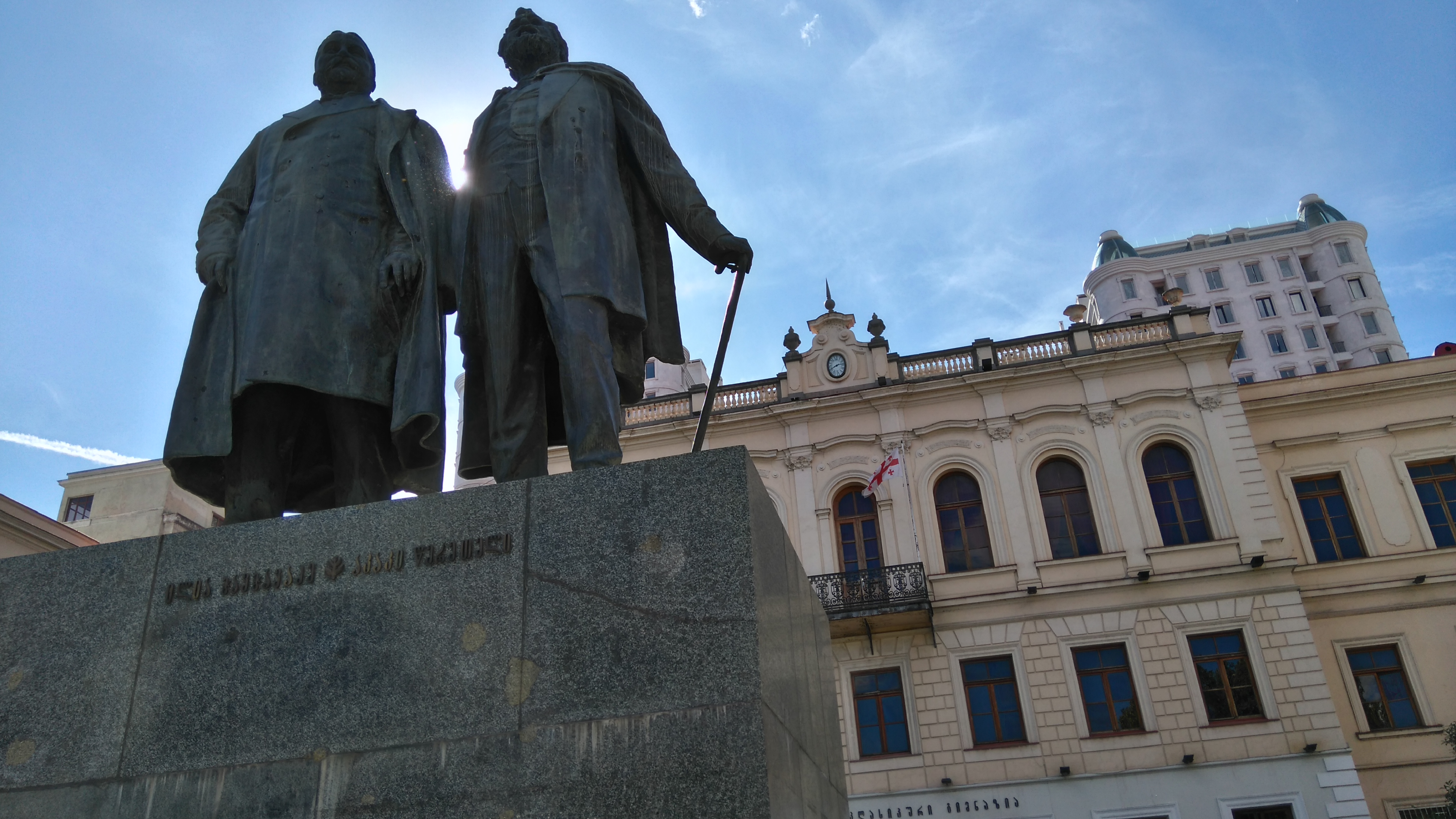 №1 საჯარო სკოლა